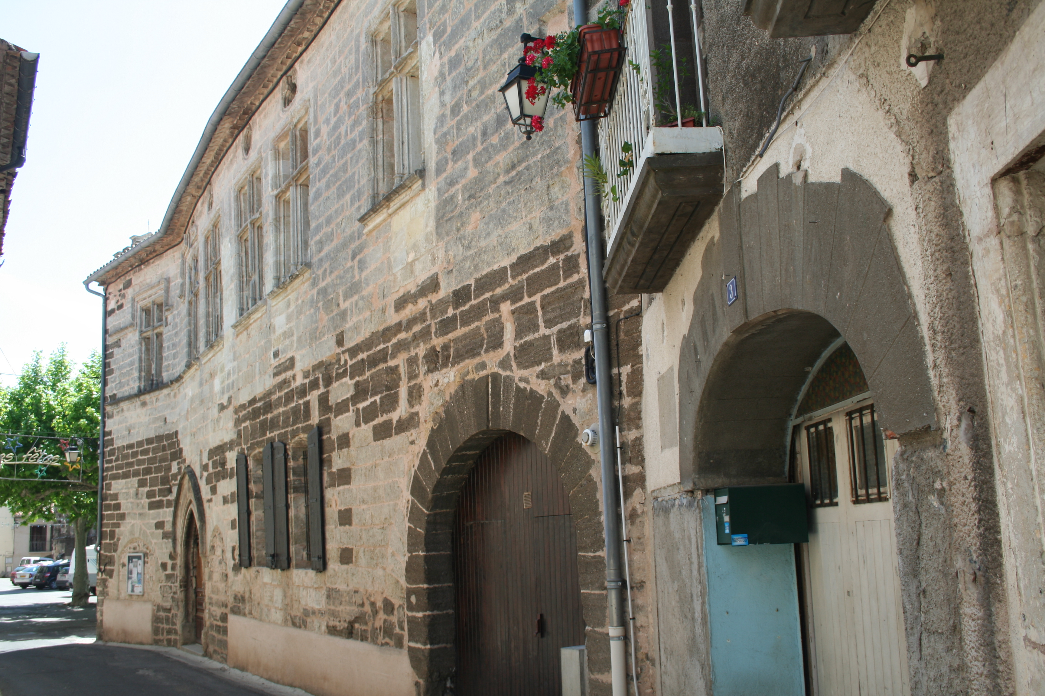 Aspiran (Hérault) - maison du viguier (XVe siècle) - façade vue latérale